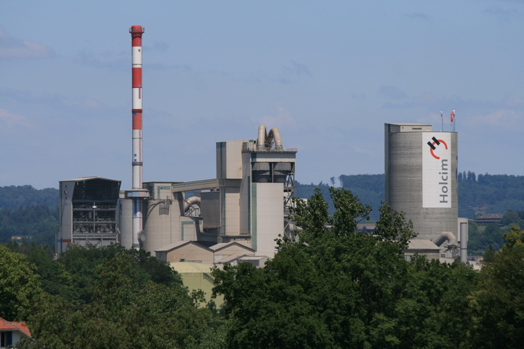 Holcom-Zementwerk in Würenlingen, Aargau, Schweiz